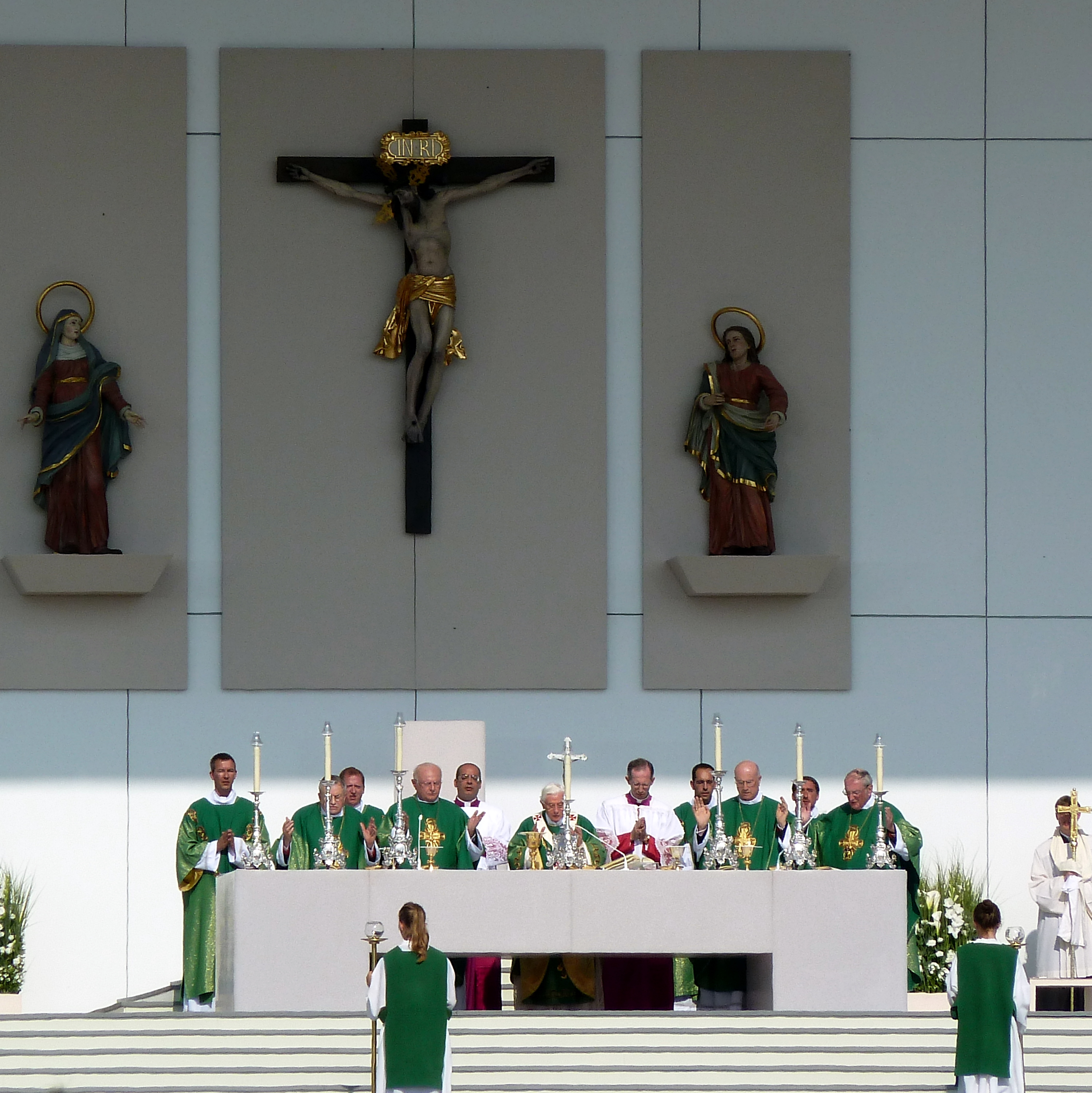 Benedikt XVI. und seine Mitzelebranten singen lateinisch das Vaterunser, das Gebet Jesu, an der päpstlichen Heiligen Messe in Freiburg: „Pater noster, qui es in caelis: sanctificetur nomen tuum. Adveniat regnum tuum. Fiat voluntas tua, sicut in caelo, et in terra. Panem nostrum supersubstantialem (cotidianum) da nobis hodie. Et dimitte nobis debita nostra, sicut et nos dimittimus debitoribus nostris. Et ne nos inducas in tentationem. Sed libera nos a malo. Amen.“